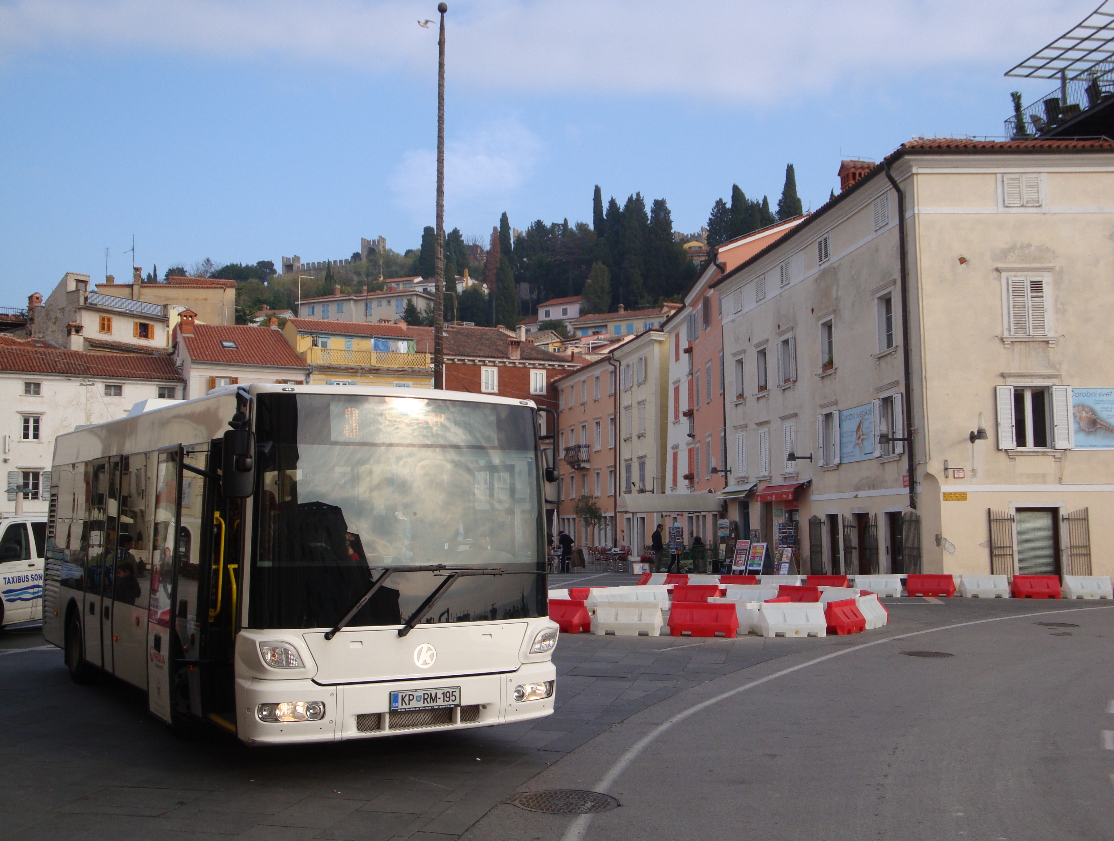 Kutsenits Hydra City I na Tartinijevem trgu v Piranu